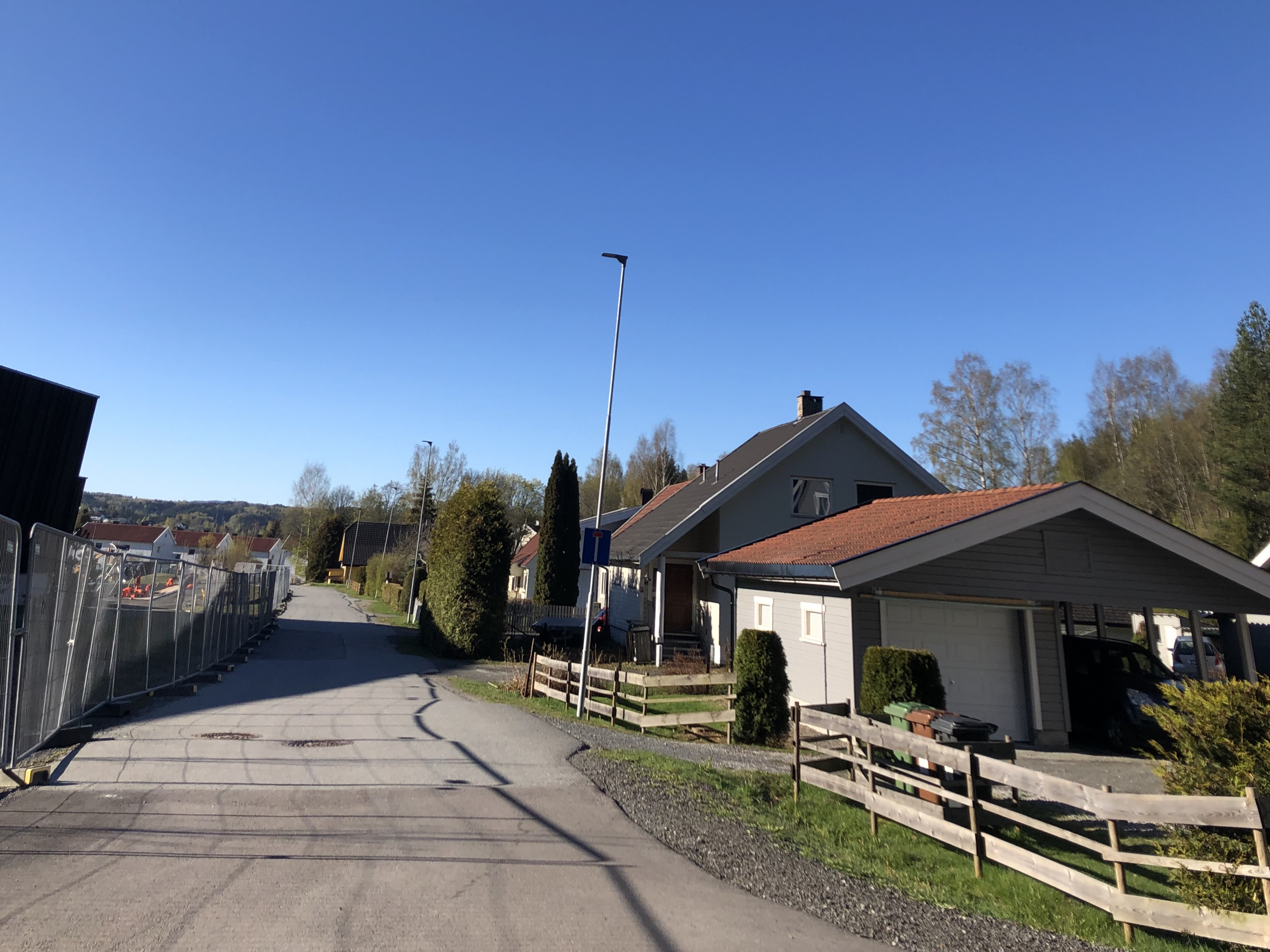 Flattumveien, Hønefoss